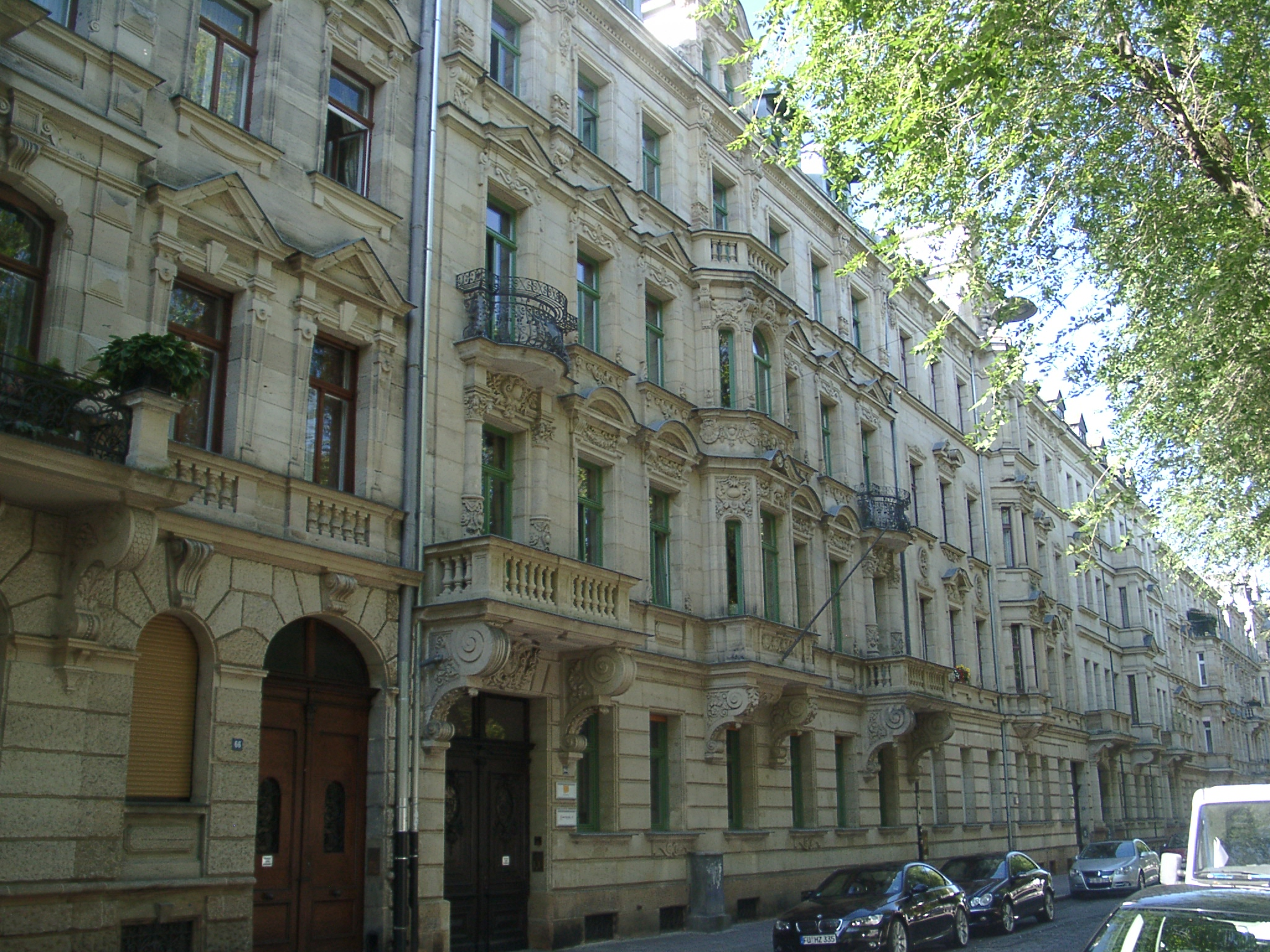 Fürth, Bildmitte: Königswarterstraße 64. Links davon z.T. Nr. 62, rechts Nr. 66 ff.